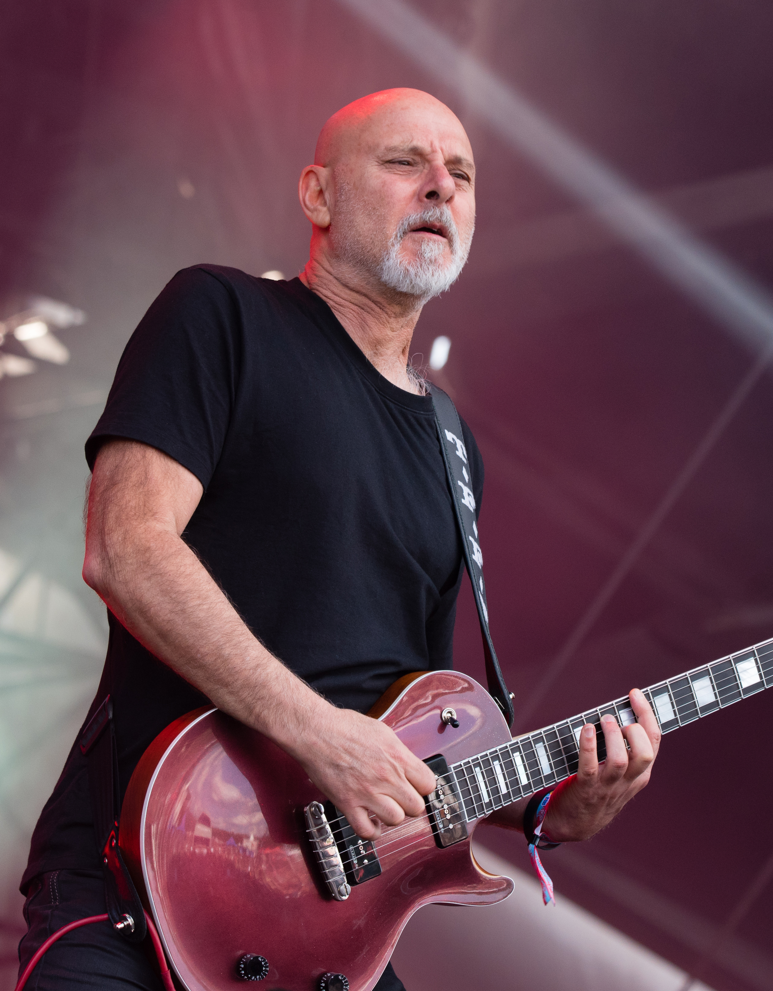 Rose Tattoo beim Werner Rennen 2018